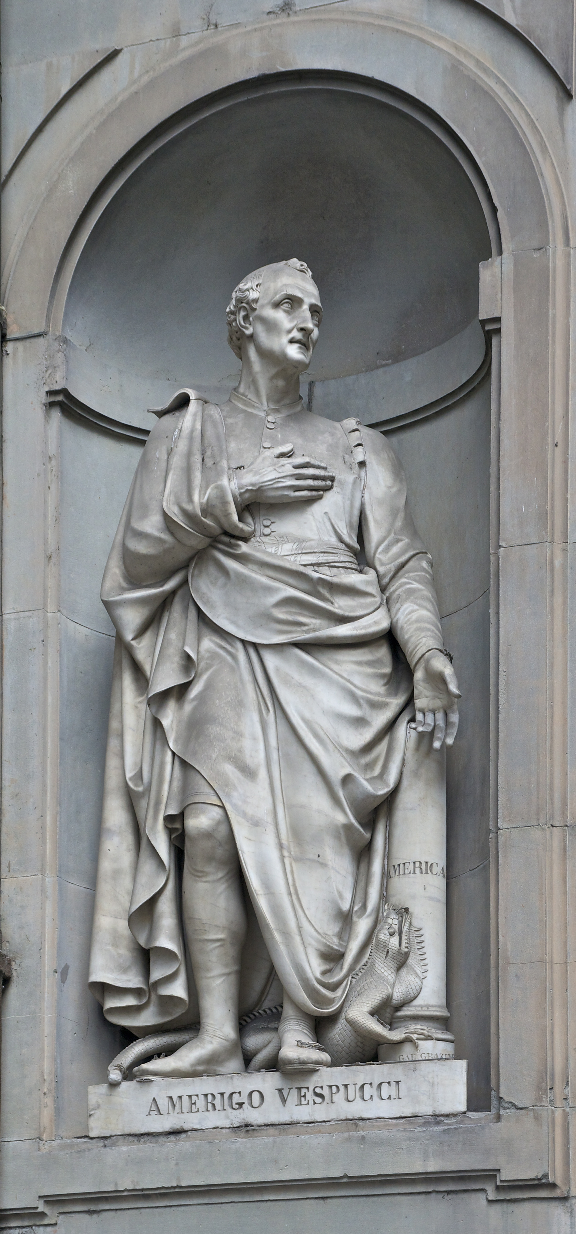 Firenze, Loggiato degli Uffizi, Statue degli „Illustri Toscani“, Statua di Amerigo Vespucci di Gaetano Grazzini.